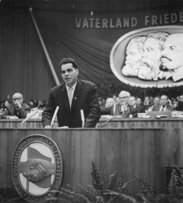 Zentralbild Kollektiv Me-Qu 19.1.1963 VI. Parteitag der SED vom 15.-21.1.1963 in der Werner-Seelenbinder-Halle in Berlin (5.Tag) UBz: Das Mitglied des Exekutivkomitees des ZK des Bundes der Kommunisten Jugoslawiens Veljko Vlahovic, bei seiner Begrüßungsrede. (Junge)